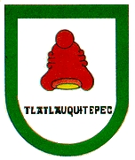 Tlatlauquitepec címere